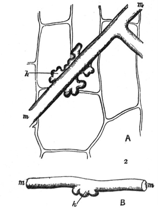 Erysiphe. A and B, mycelium (m), with haustoria (h)